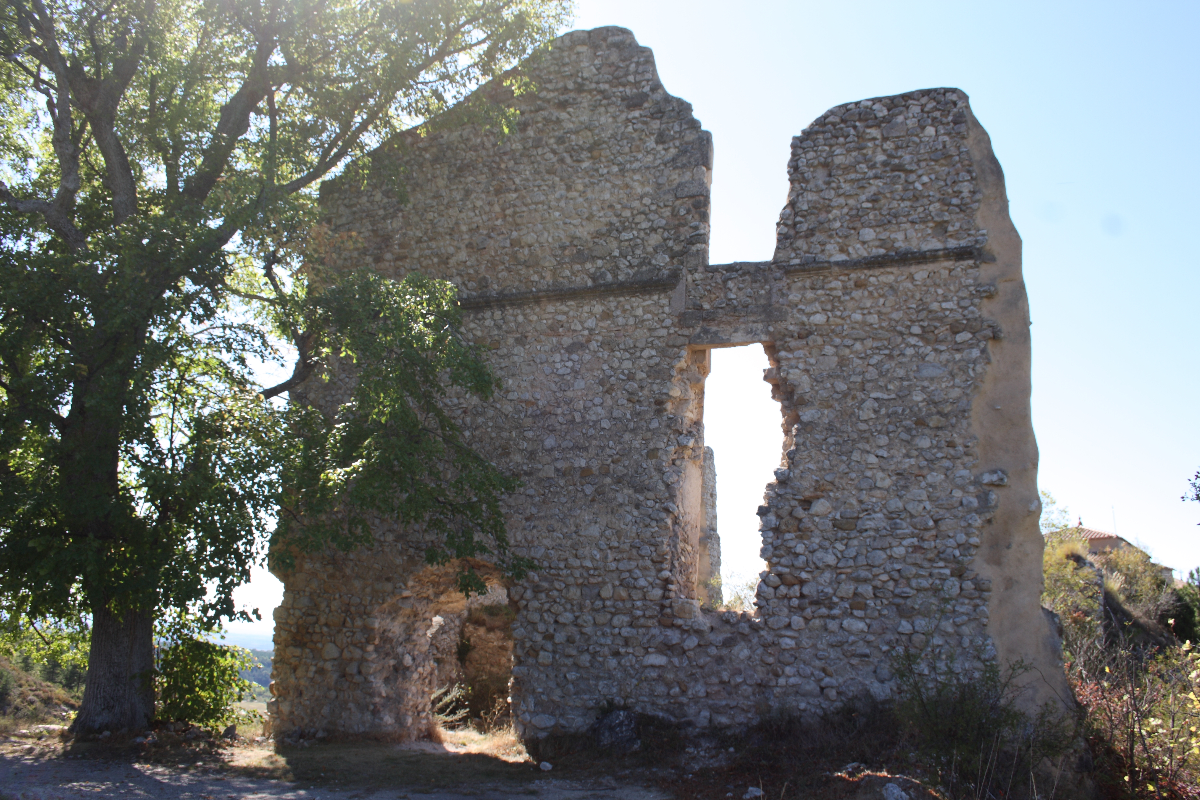 Ruinen des Schlosses in Saint-Jurs